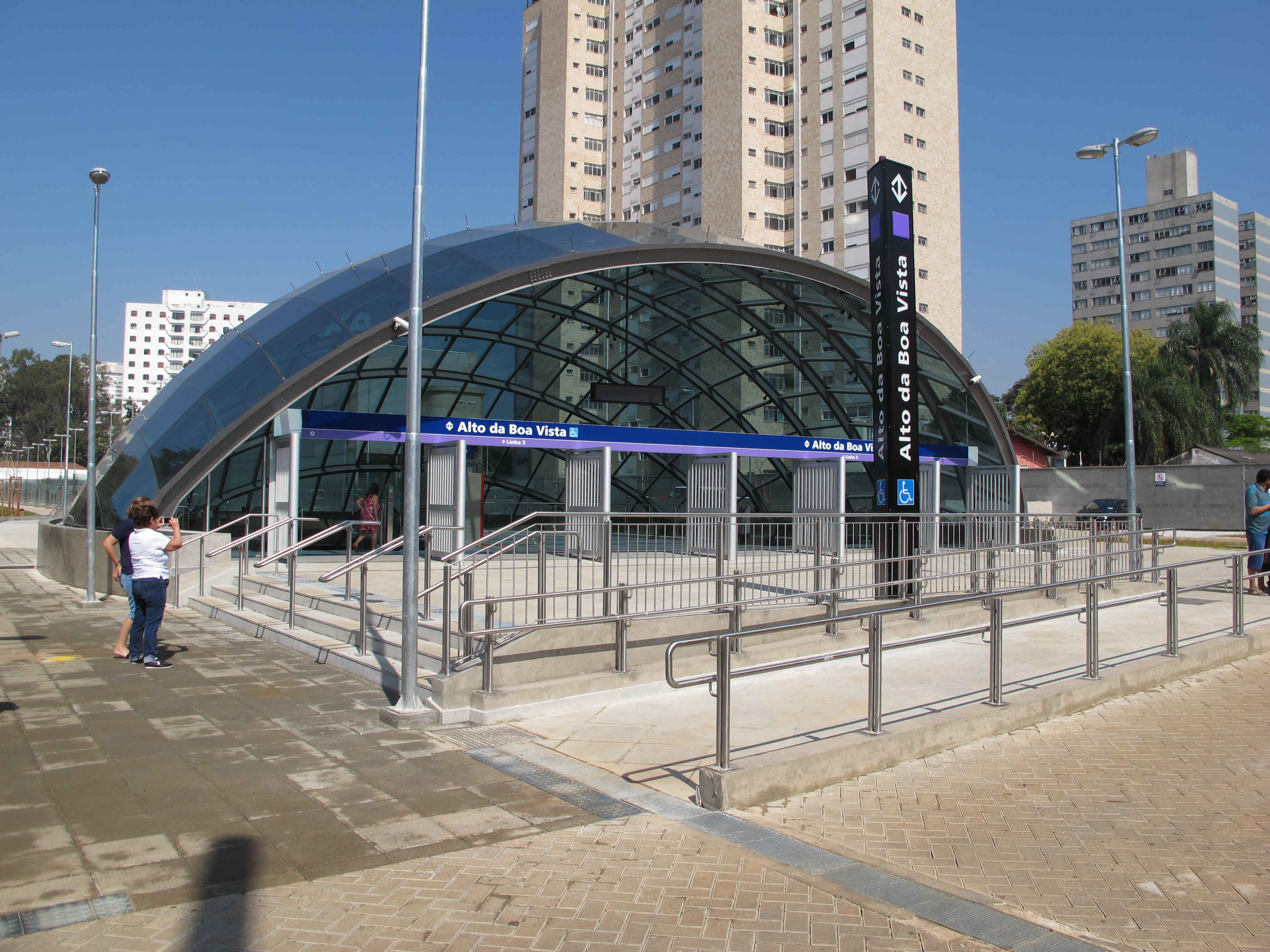 Acesso principal da estação Alto da Boa Vista da Linha 5 do Metrô de São Paulo.